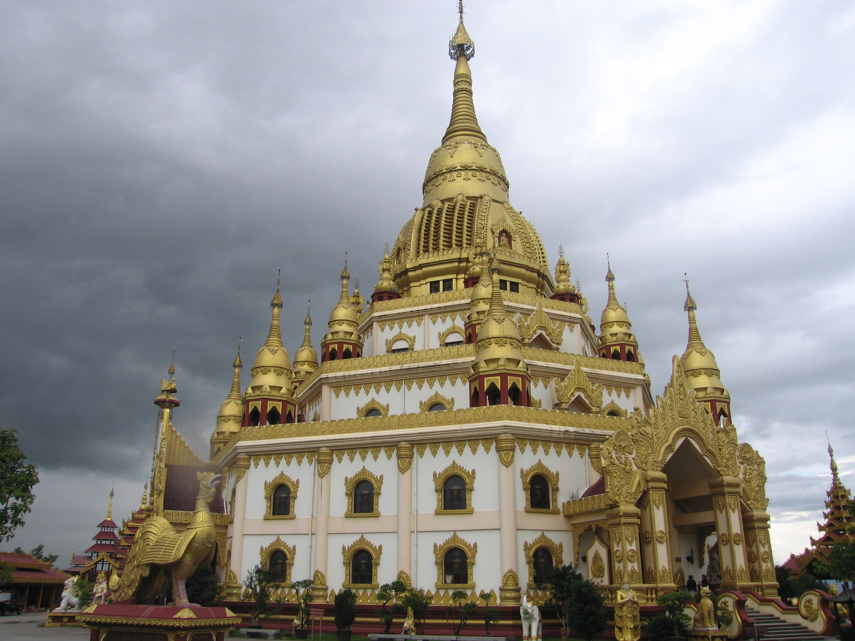 芒市勐焕大金塔